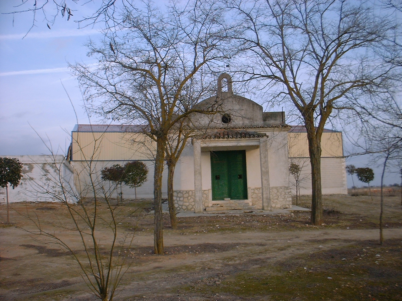 Hiszpania, Kastylia-La Mancha, Toledo, Stół Okani (Mesa de Ocańa), Noblejas, Kaplica Świętego Izydora Oracza